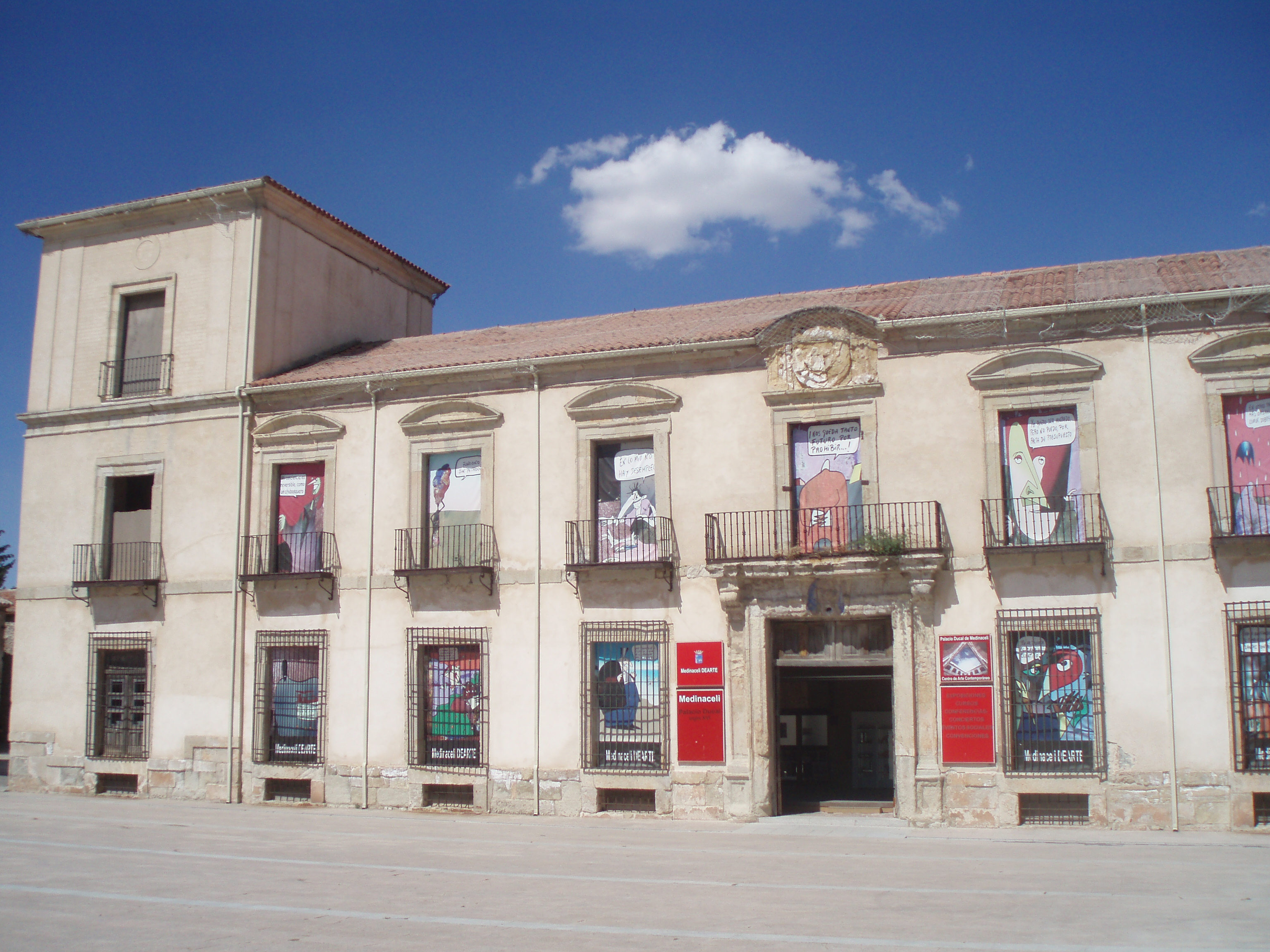 Palacio ducal de Medinaceli. Soria, (España).